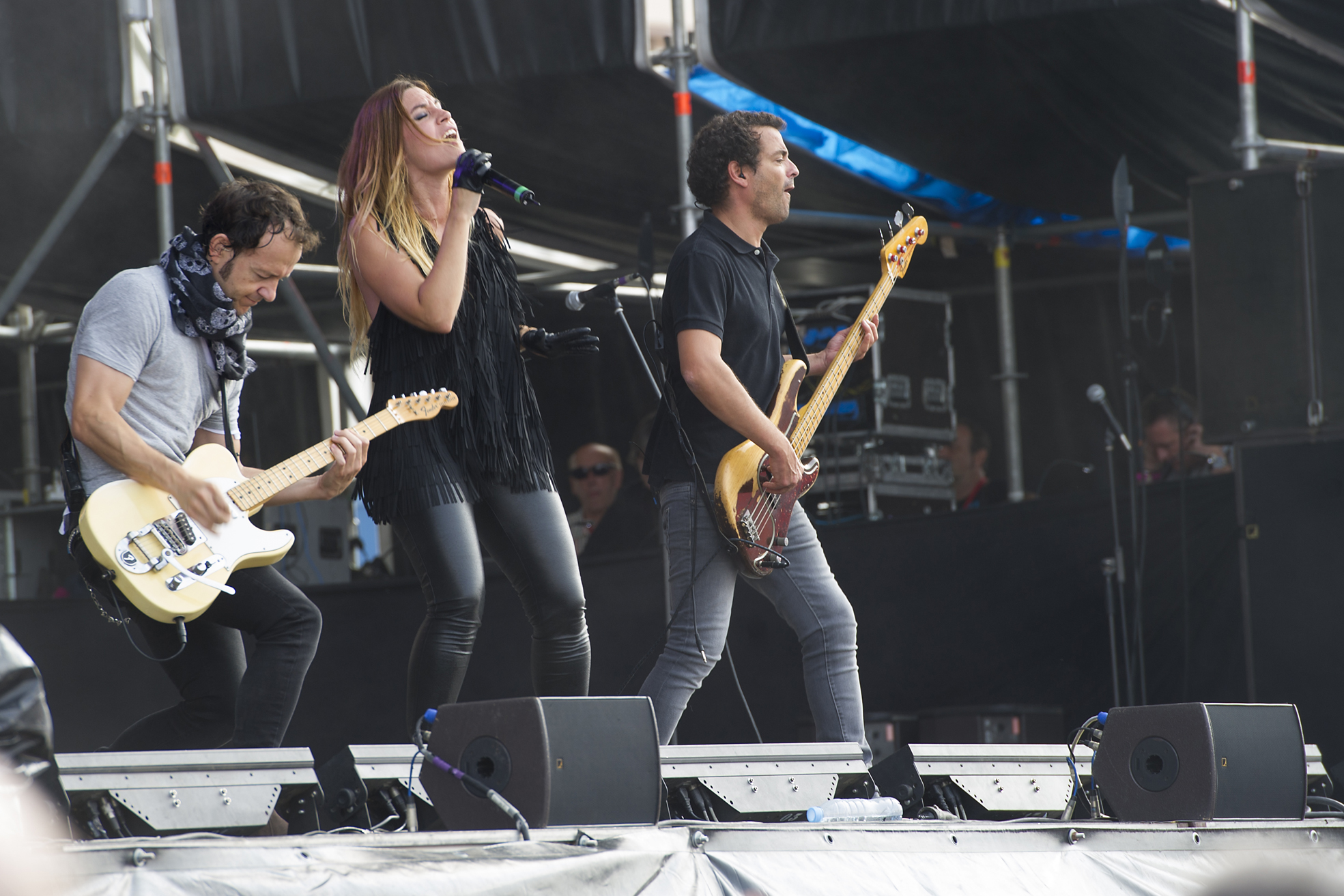 GIBRALTAR MUSIC FESTIVAL 2013 - LA OREJA DE VAN GOGH